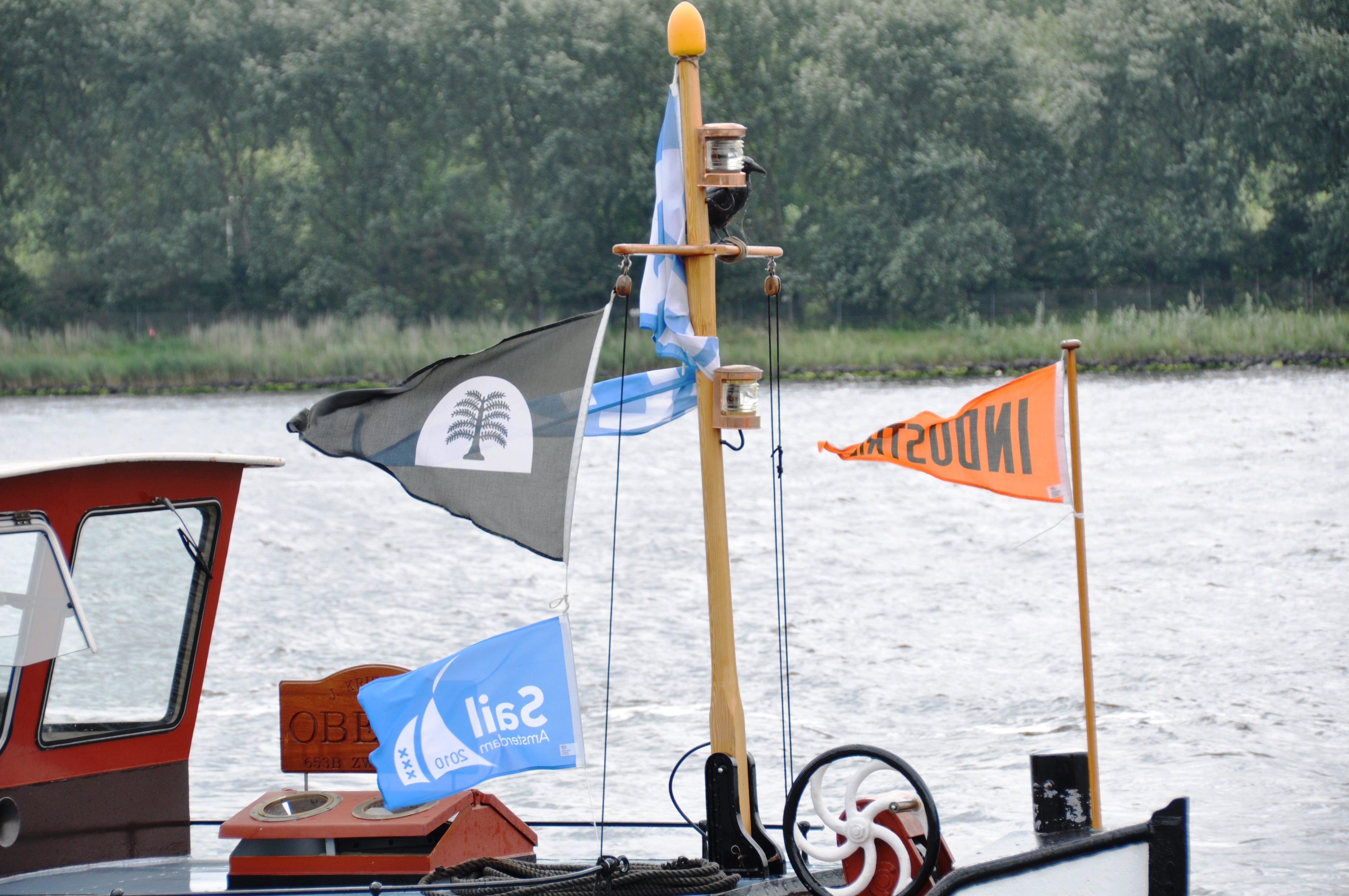 De OBELIX onderweg naar Sail Amsterdam 2010.